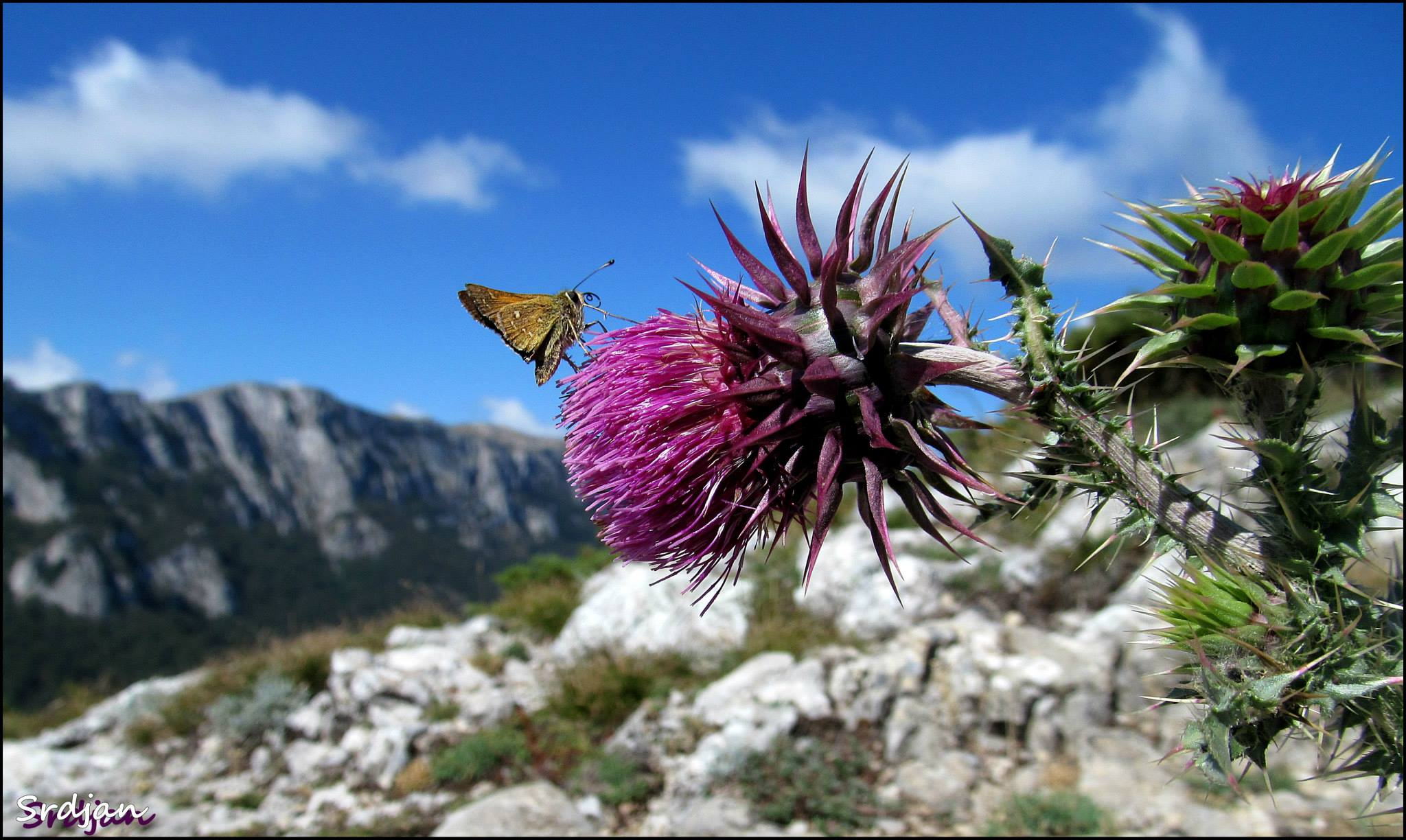 Srpski (latinica): Suva planina, Srbija. Vegetacija pukotina stena, siparišta i točila.